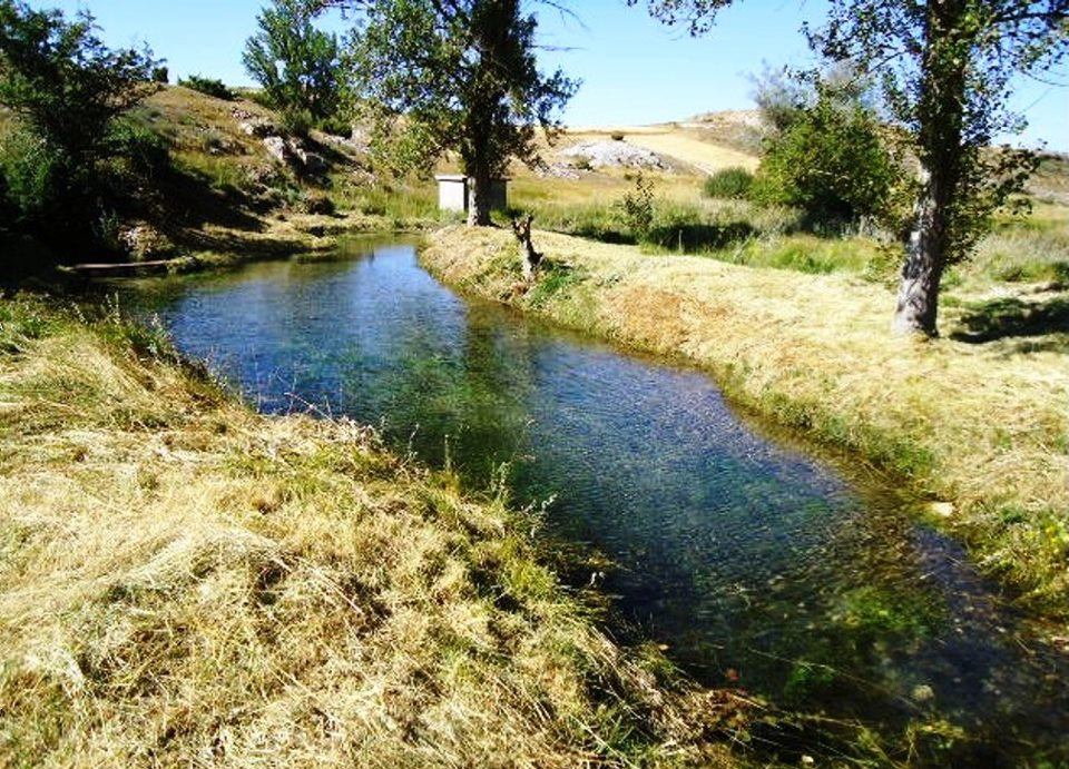 "Las Fuentes"